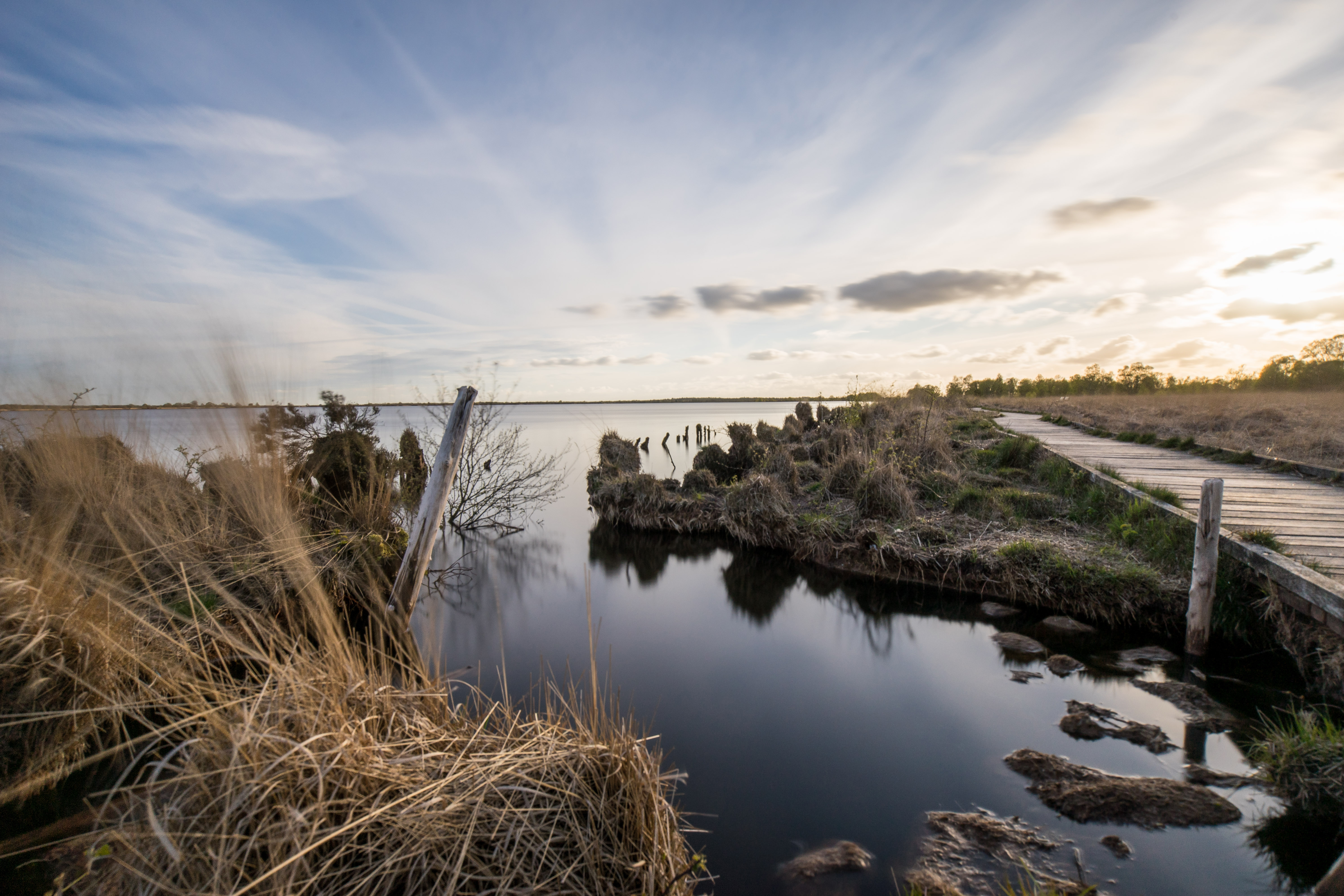 Sonnenuntergang am Ewigen Meer (Langzeitbelichtung), Naturschutzgebiet „Ewiges Meer und Umgebung“